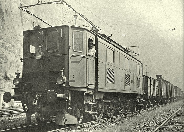 Lokomotive Fb 4/6 (später Ce 4/6) Nr. 371 vor einem Güterzug im Bahnhof Iselle di Trasquera auf der italienischen Seite des Simplontunnels.